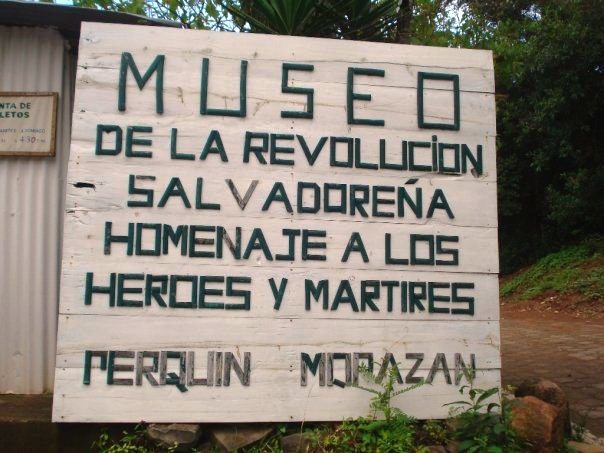 Entrada Museo de la Revolución